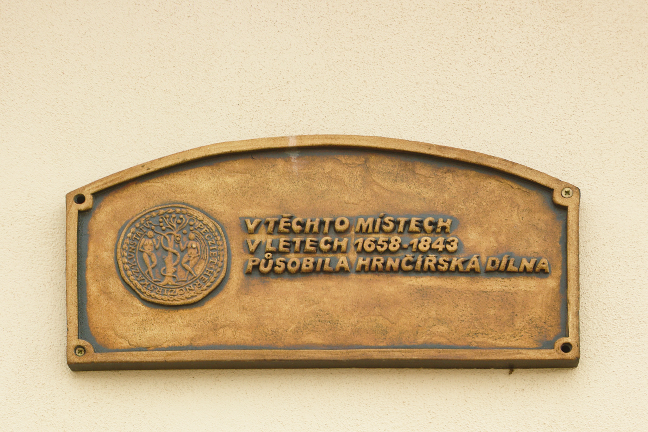 Pamětní deska, náměstí Krále Jiřího, Kunštát, okres Blansko